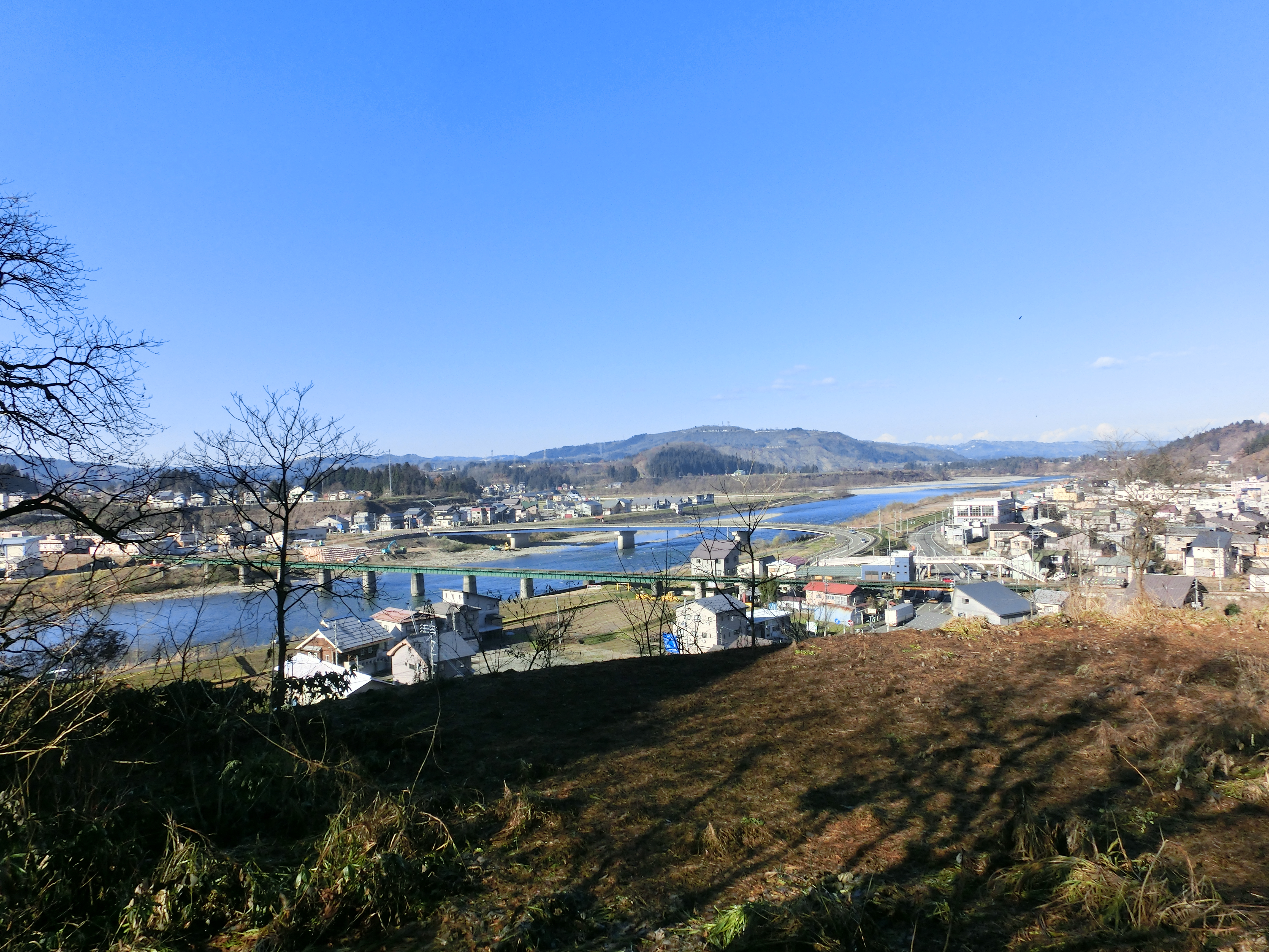 この画像は2017年12月7日朝、新潟県長岡市東川口にて撮影された飯山線魚野川橋梁、川口橋、国道17号、魚野川と信濃川の合流点の写真。信濃川対岸の山は山本山 (小千谷市)。